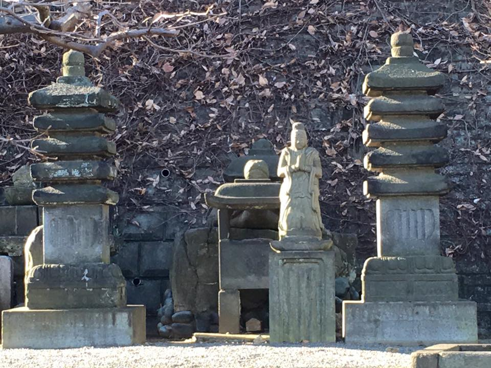 蓮法寺(横浜市)にある浦島太郎父子の供養塔